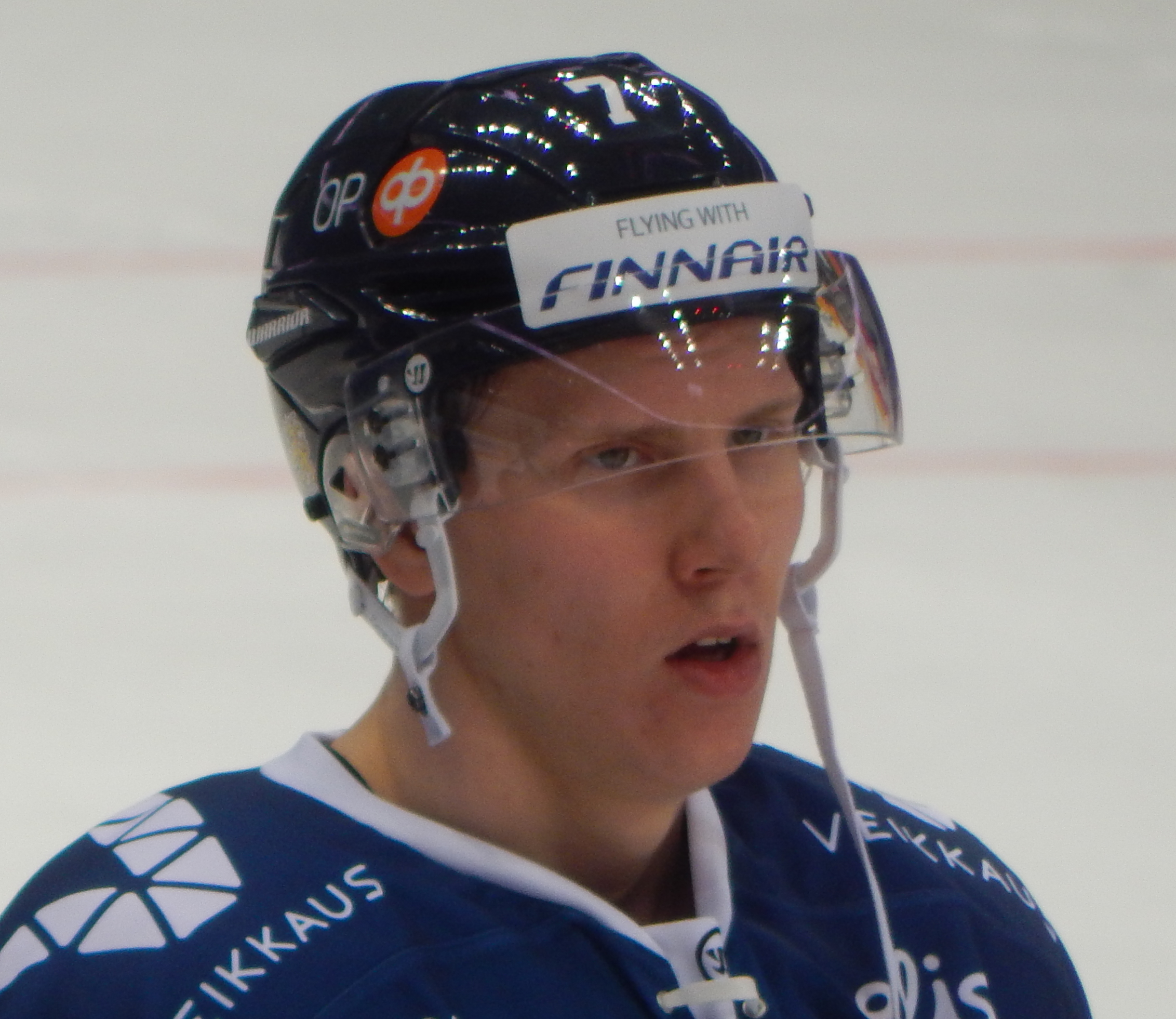 Кубок Первого Канала 2017, матч Финляндия - Южная Корея (15 декабря 2017) 6 HAKANPÄÄ,Jani 7 MIKKOLA,Niko